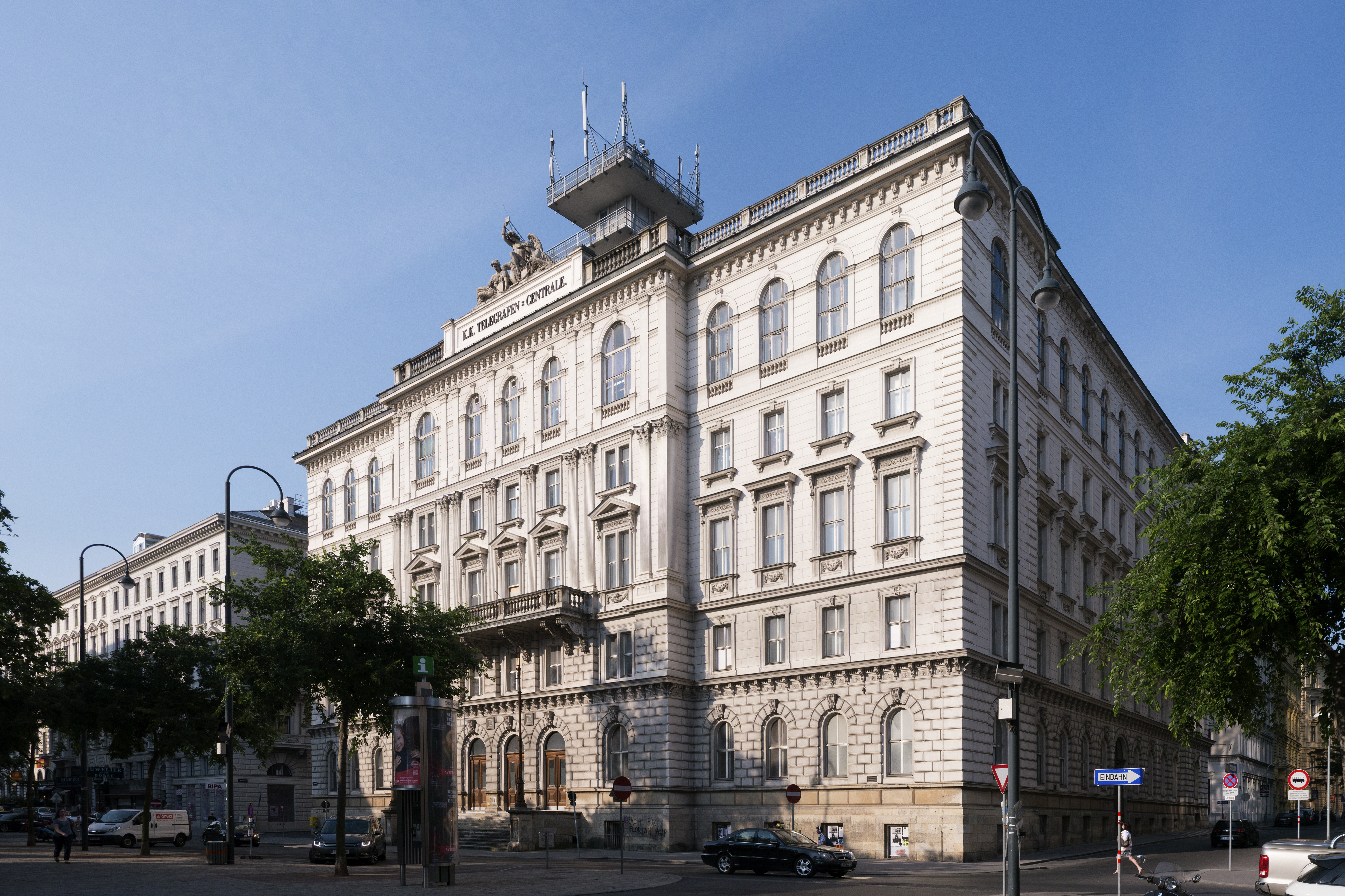 Telegraphenzentrale